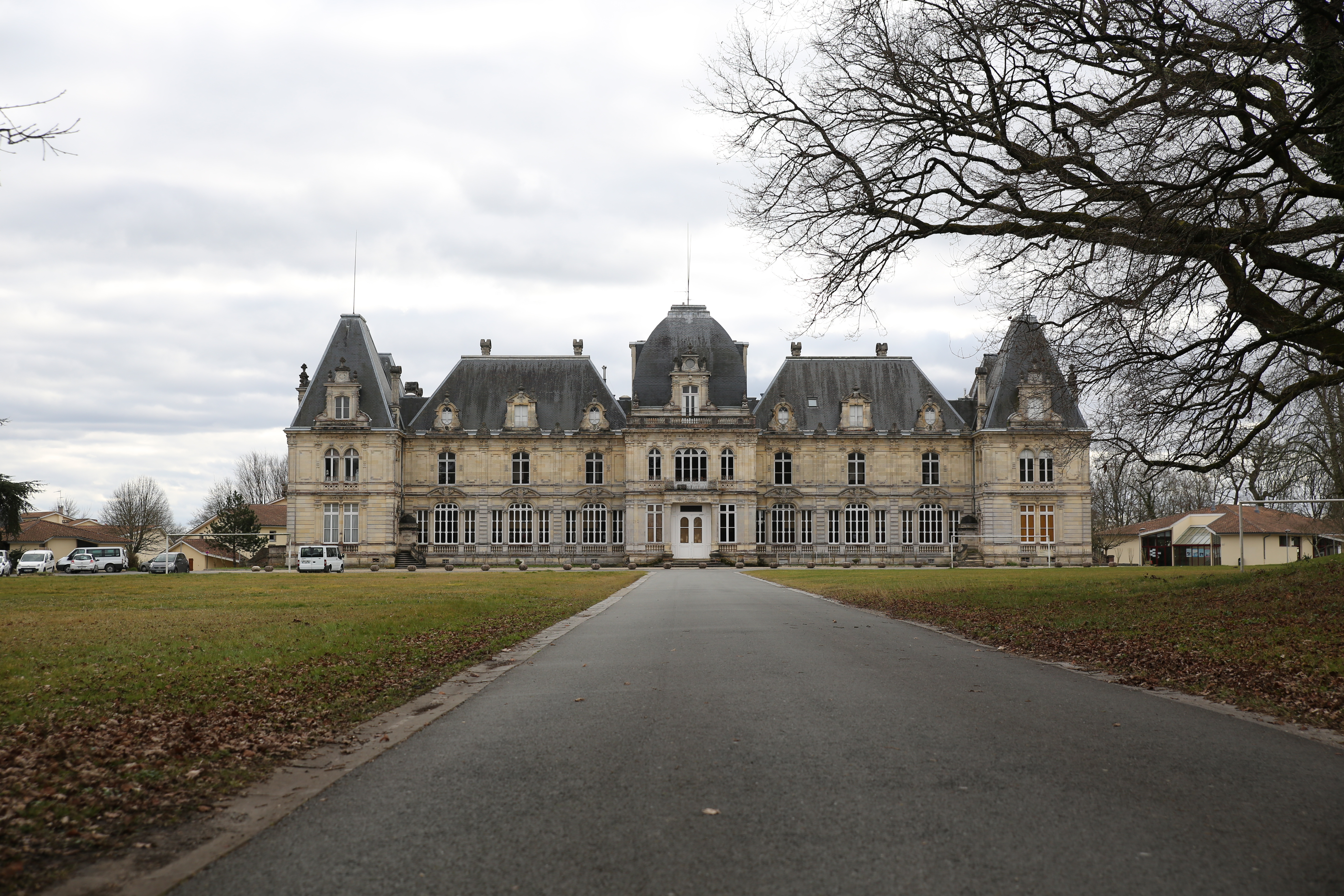 Château Dulamon, construit vers 1865, presque à la même place que l'ancien château fort du Luc, anciennement propriété de la famille Dulamon. Depuis 1945, le château est propriété de l'œuvre des Orphelins Apprentis d'Auteuil qui y a installé une école technique à partir de 1948.